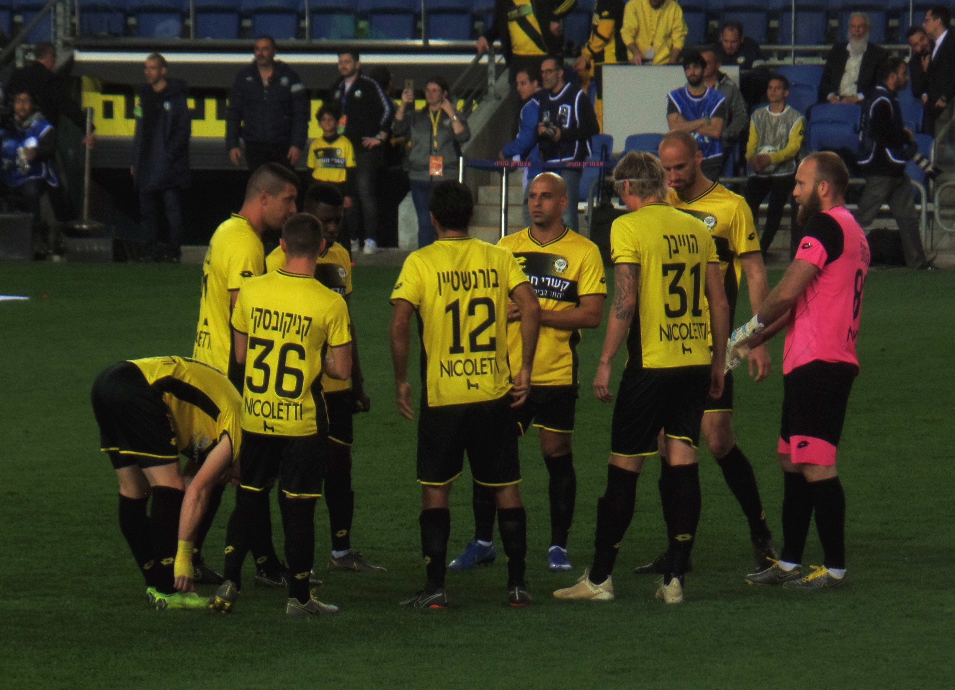 שחקני מכבי נתניה, 2019